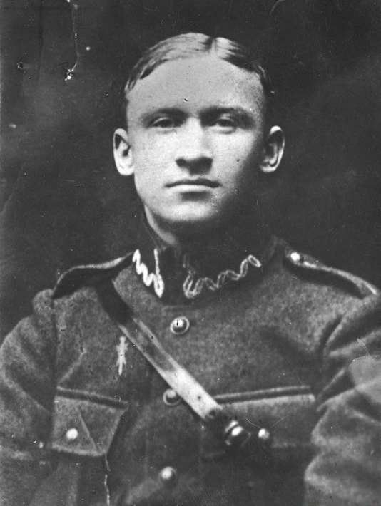 Józef Muraszko – oskarżony o zabójstwo komunistów Walerego Bagińskiego i Antoniego Wieczorkiewicza. Fotografia portretowa pochodząca z archiwum fotograficznego Koncernu Ilustrowanego Kuriera Codziennego.